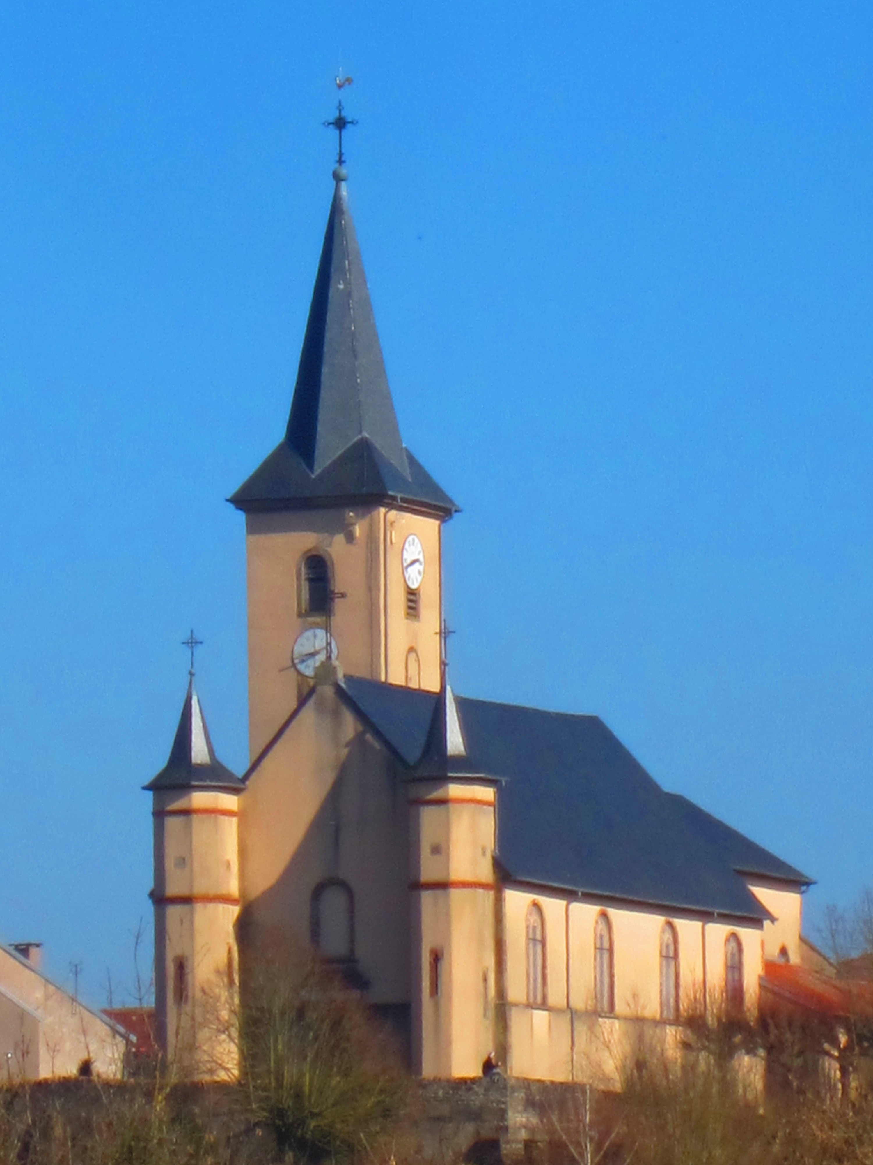 Moyen eglise